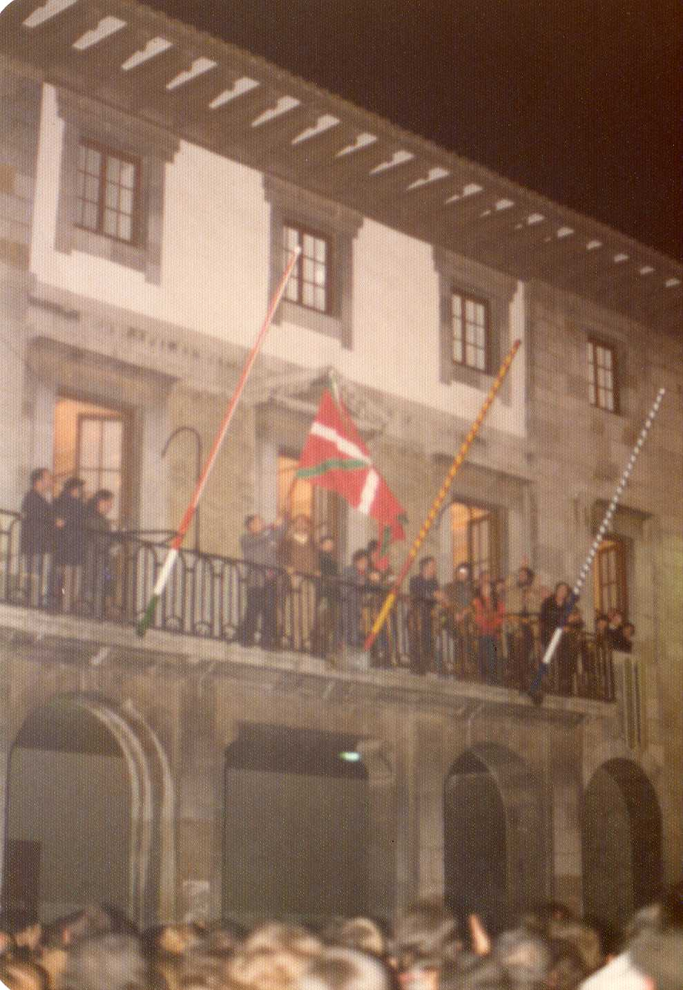 Ikurrina Andoaingo udaletxean, 1977ko urtarrila